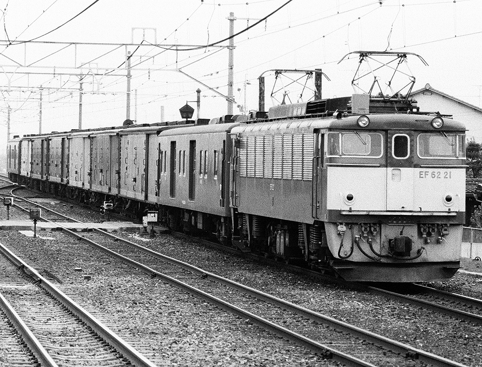 国鉄EF62 21けん引荷物列車